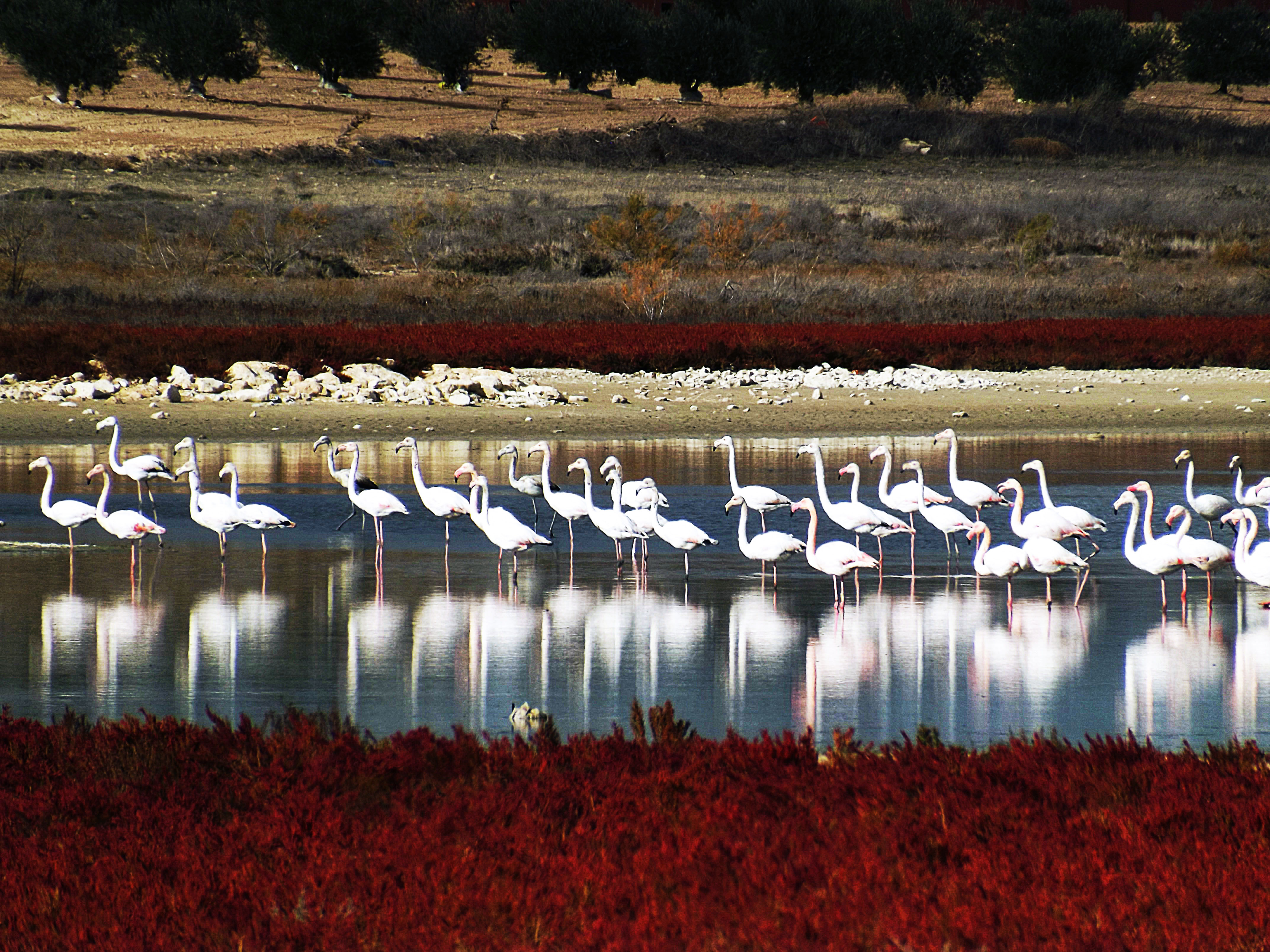 Flamencos en la Laguna Larga de Villacañas, Toledo